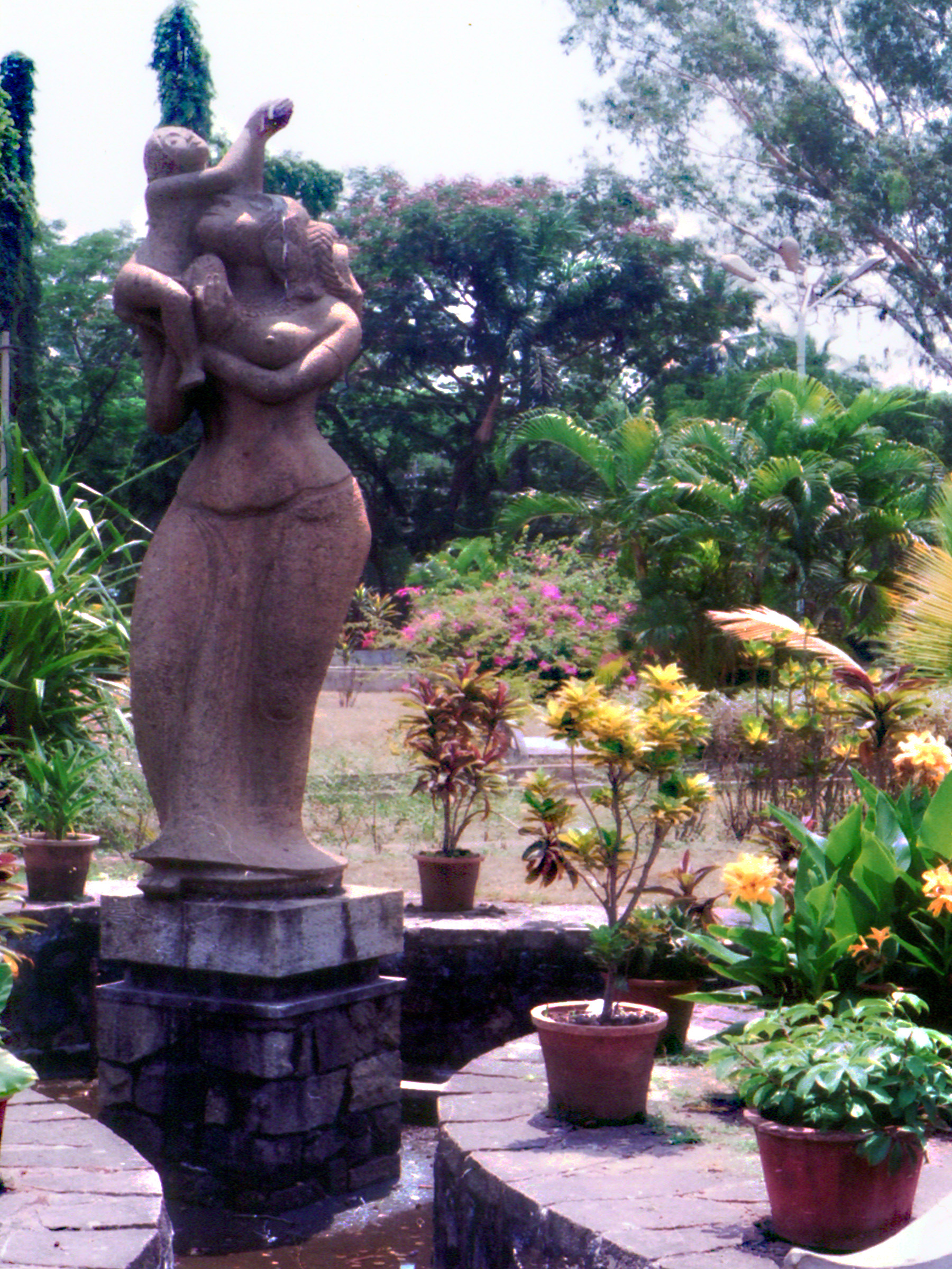 അമ്മയുംകുഞ്ഞും.എം.വി.ദേവന്റെ ശില്പം